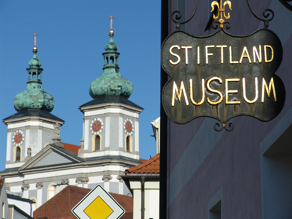 Am Stiftlandmuseum in Waldsassen. Im Hintergrund die beiden Türme der Basilika. (2005)